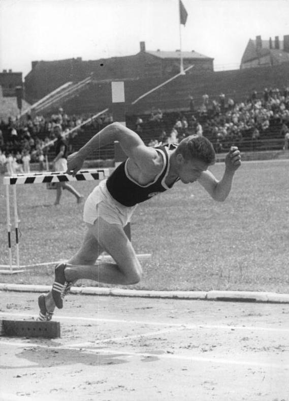 Grogorenz Zentralbild Zim-Wen 13.7.1957 2. Tag der Deutschen Leichtathletik-Meisterschaft im Berliner Walter-Ulbricht-Stadion. UBz: 2. Vorlauf zum 200-m-Lauf der Männer. Der spätere Sieger dieses Vorlaufes Grogorenz kurz nach dem Start.